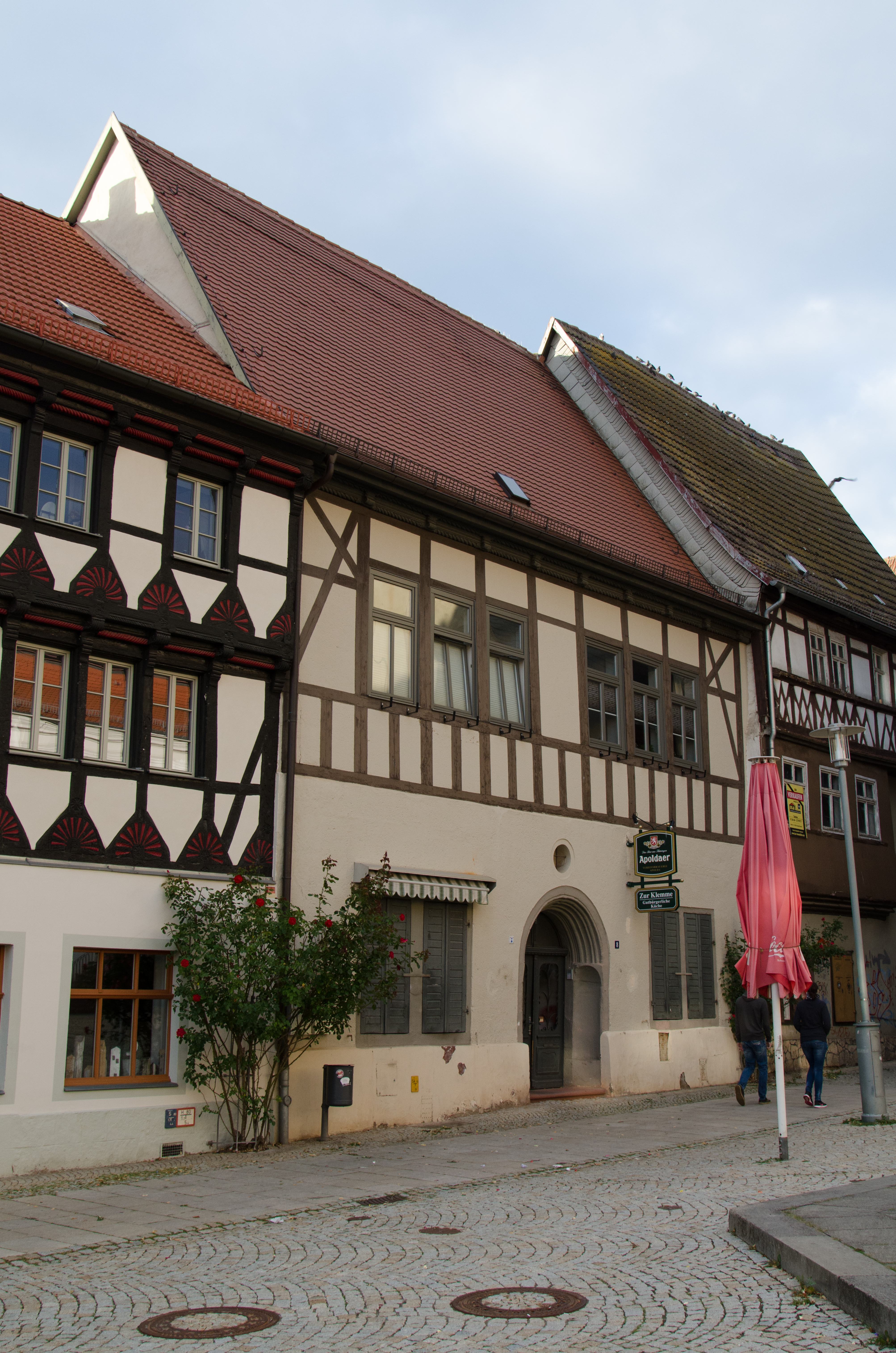 Sangerhausen, Markt 8